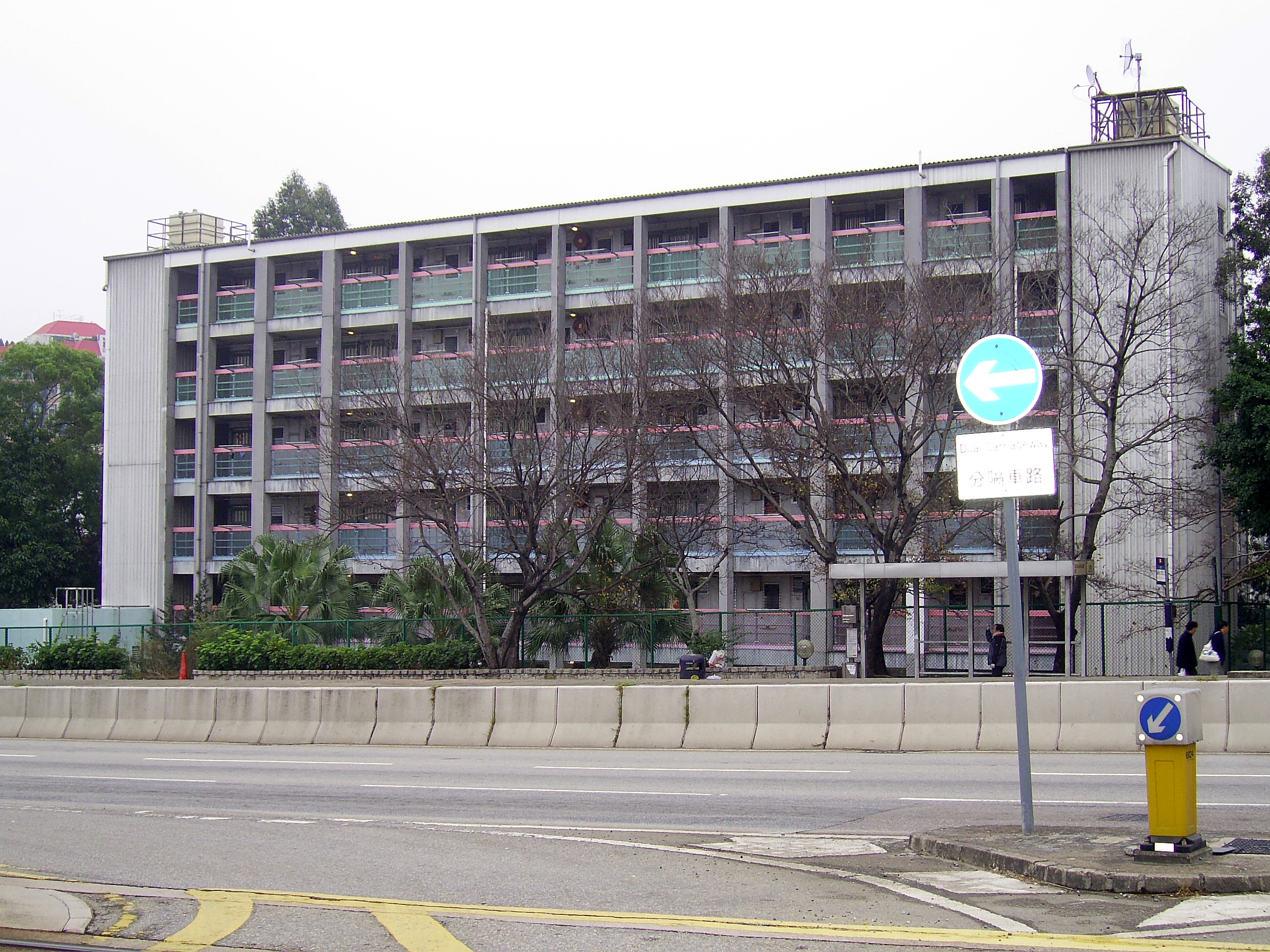 中文（香港）: 朗邊中轉房屋第16座